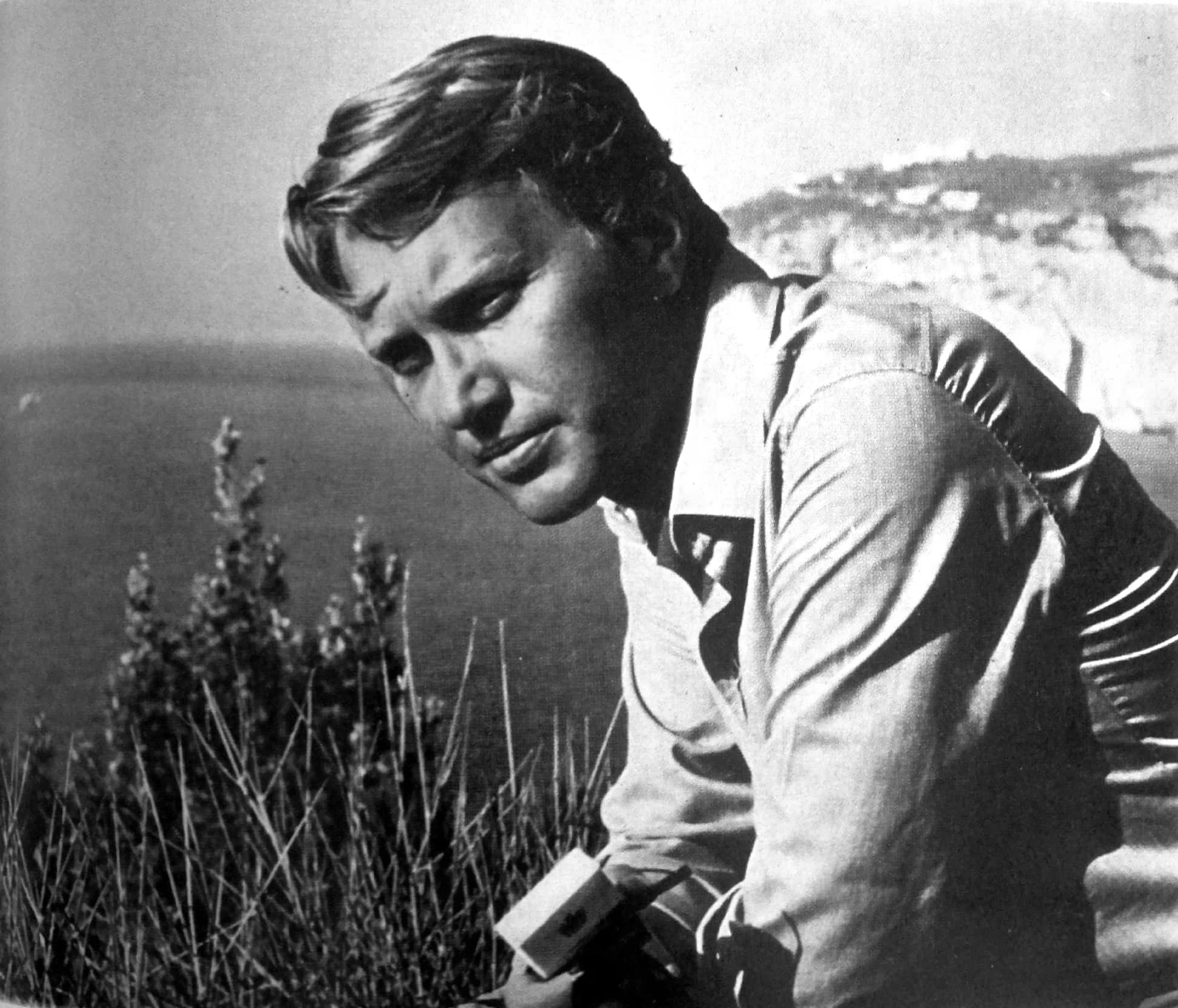 Foto in bianco e nero